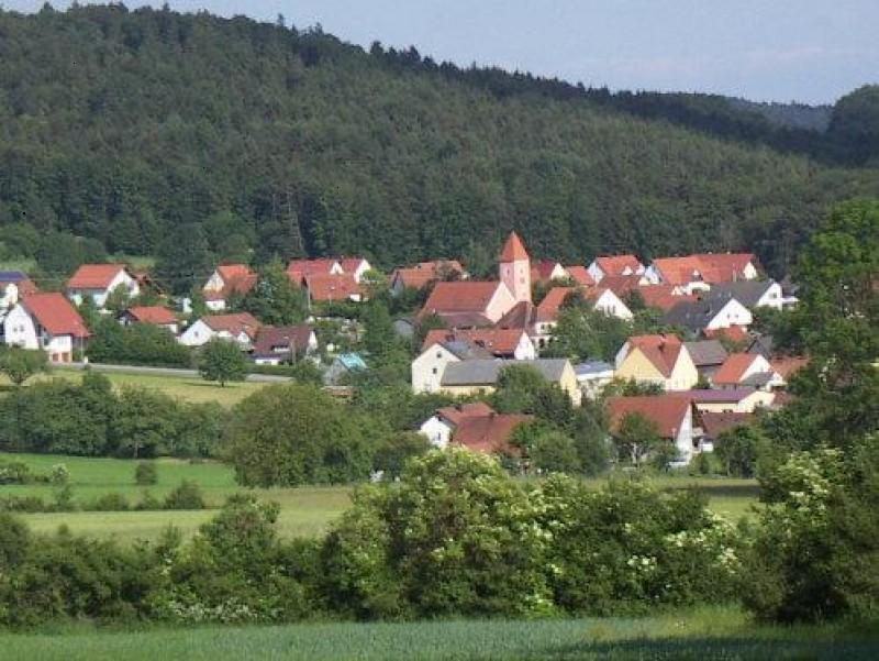 92262 Birgland